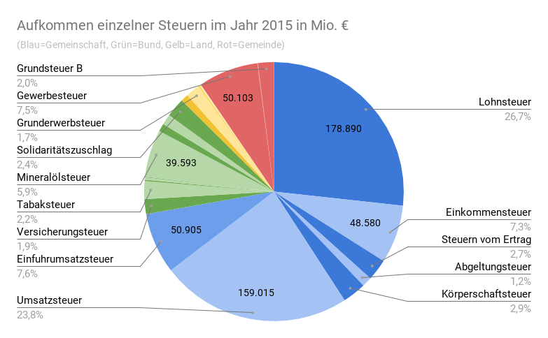 Die Reihenfolge der Werte entspricht der Steuerart-Tabelle auf der Wiki-Seite Steueraufkommen.